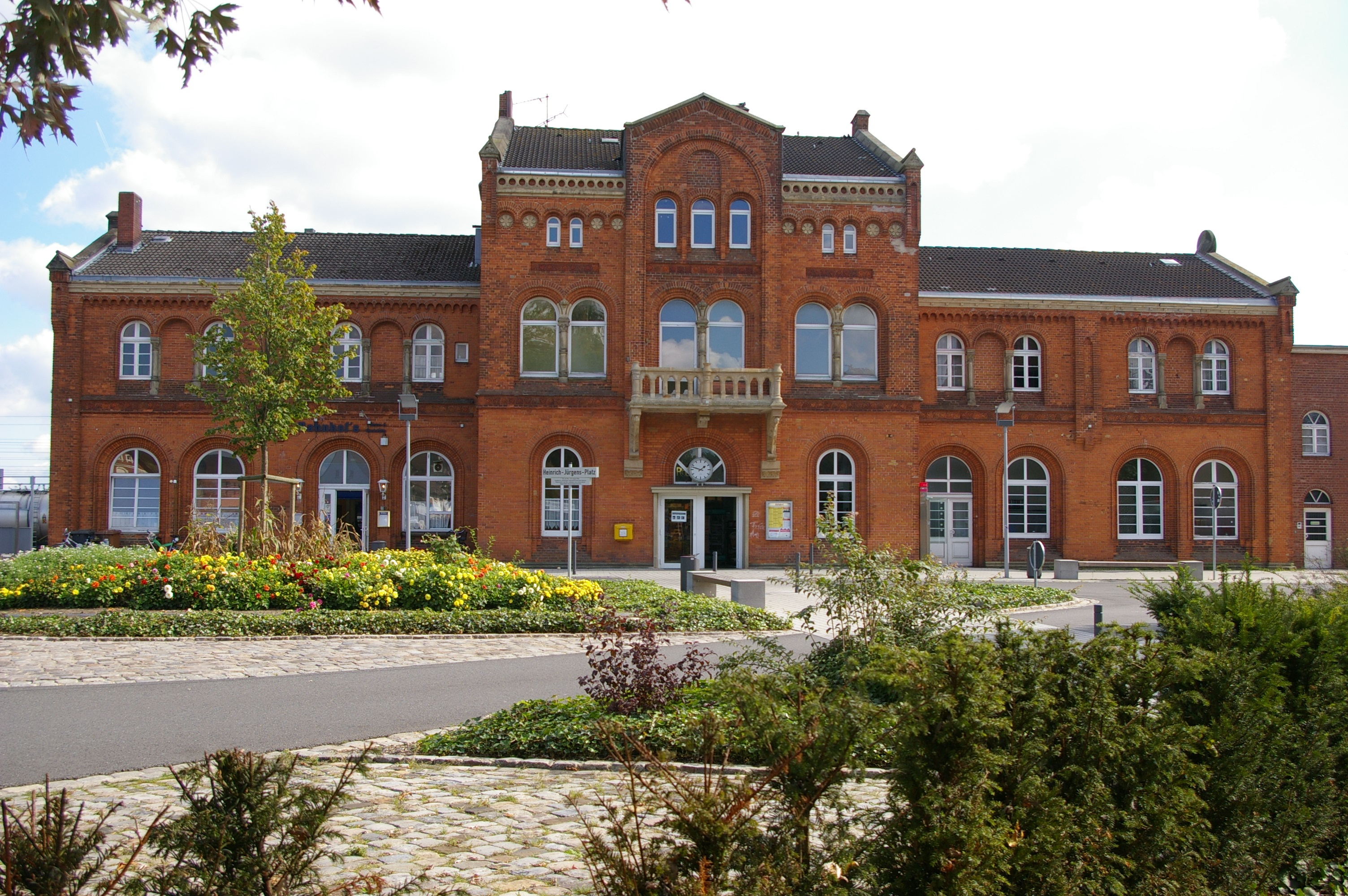 Das Bahnhofsgebäude am Diepholzer Bahnhof